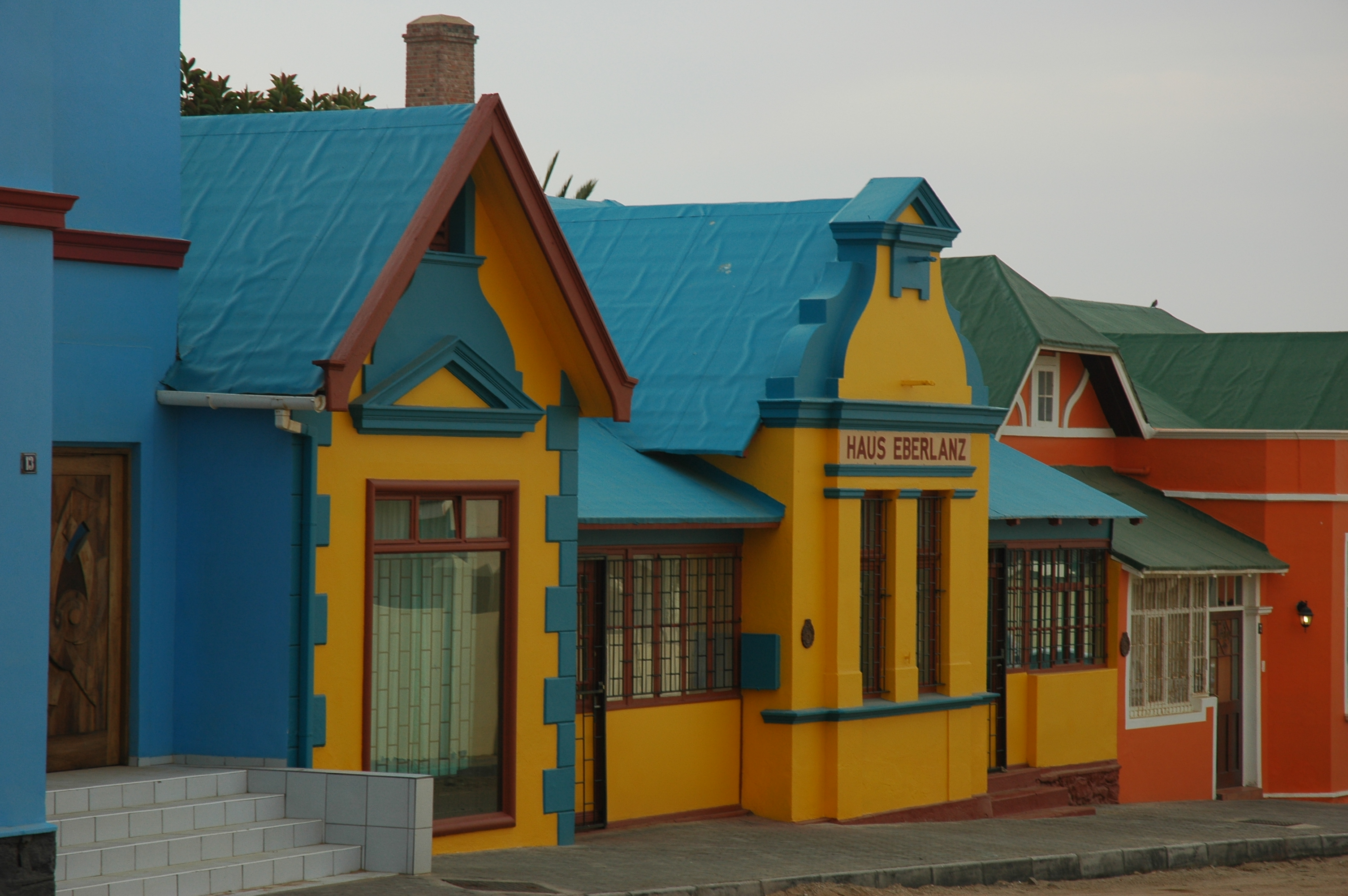 Namibie Lüderitz Photographie prise par GIRAUD Patrick